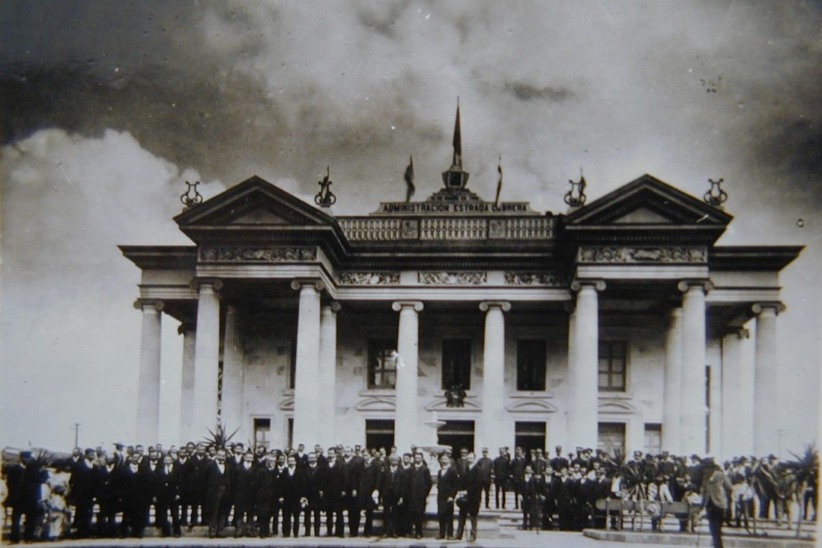 Así lucia el día de su reinauguración el 21 de noviembre de 1908